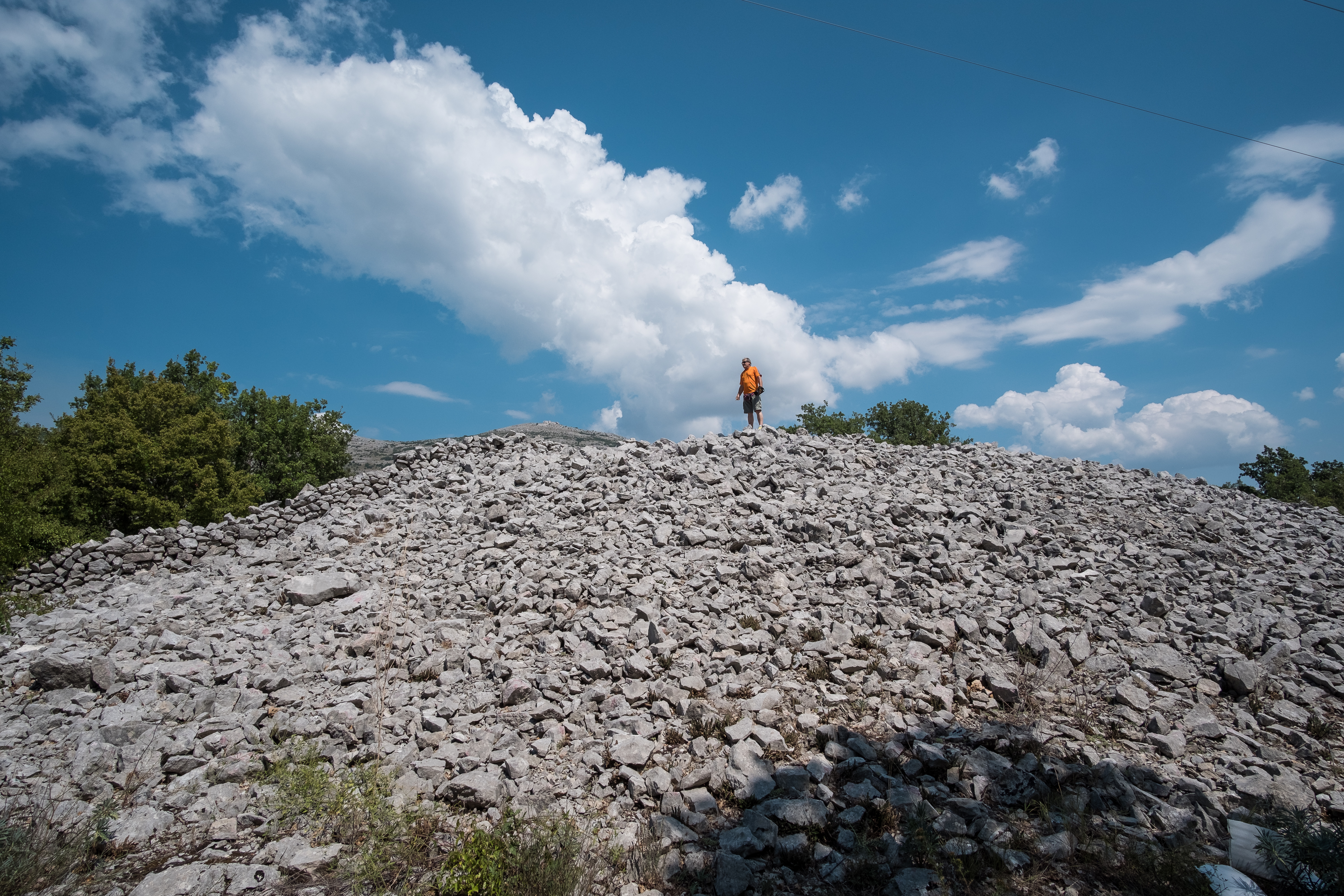 This image was uploaded as part of Trace of Soul 2018. Kamena gomila (tumulus) u selu Gomiljani kod Trebinja